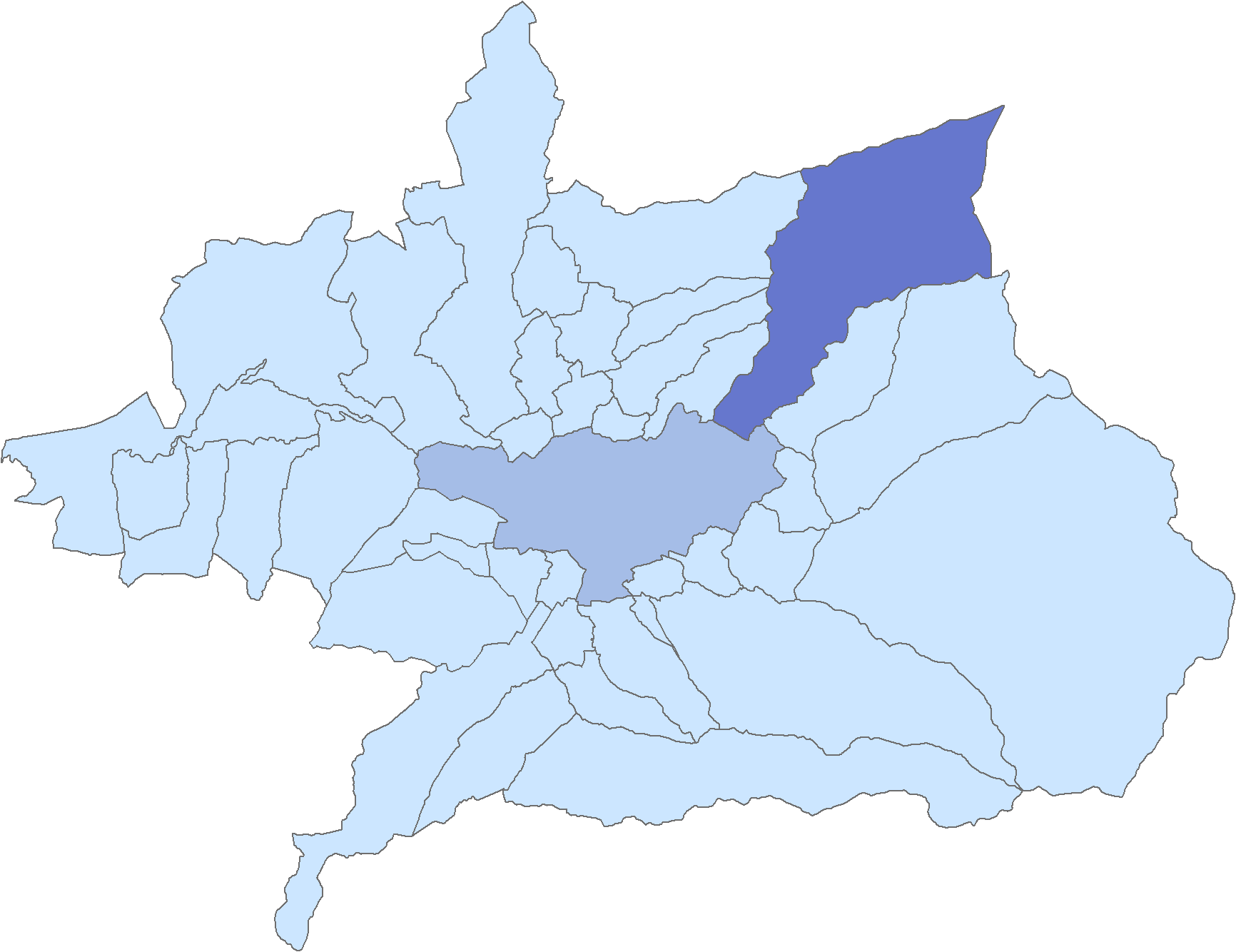 Situación del municipio de Huétor de Santillán respecto a la comarca de la Vega de Granada, en España.